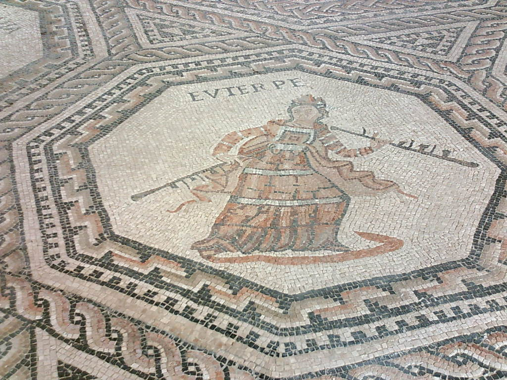 Euterpe auf dem röm. Mosaik in Vichten